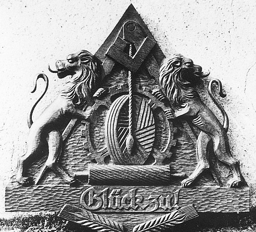 Original image description from the Deutsche Fotothek Triebischtal-Miltitz. Müllerwappen der Miltitzer Mühle